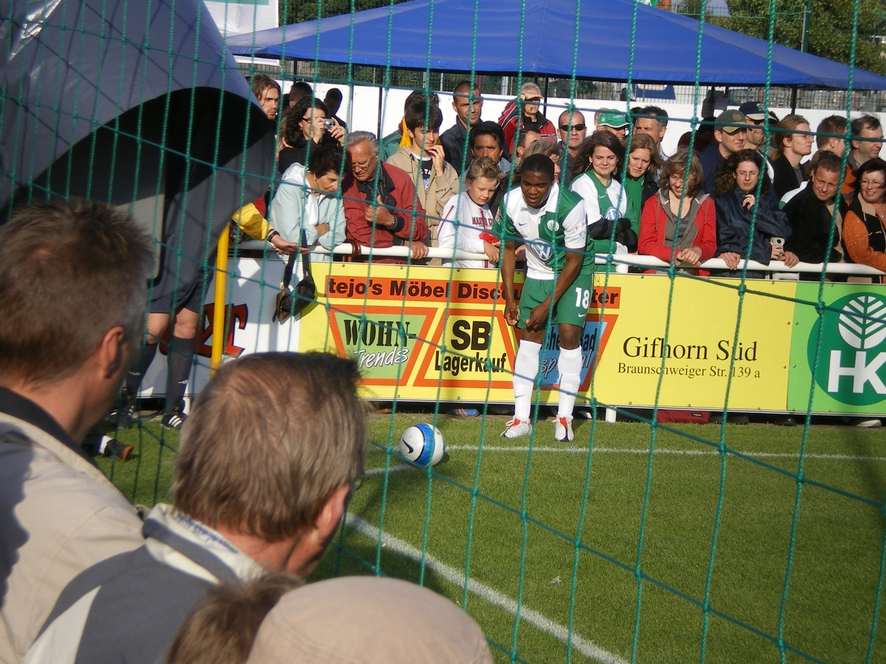 Cédric Makiadi